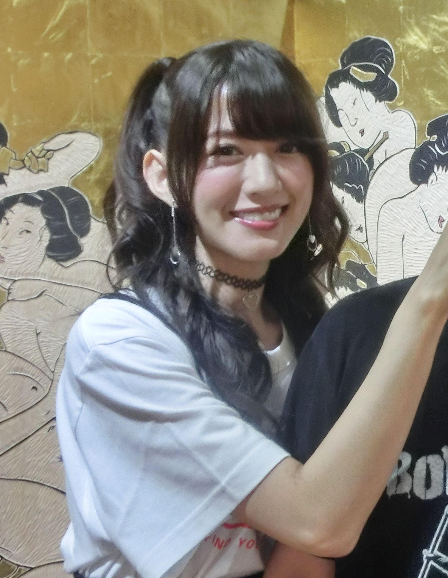 KIJIMA AIRI （2018年10月6日、FANZA×#FR2）